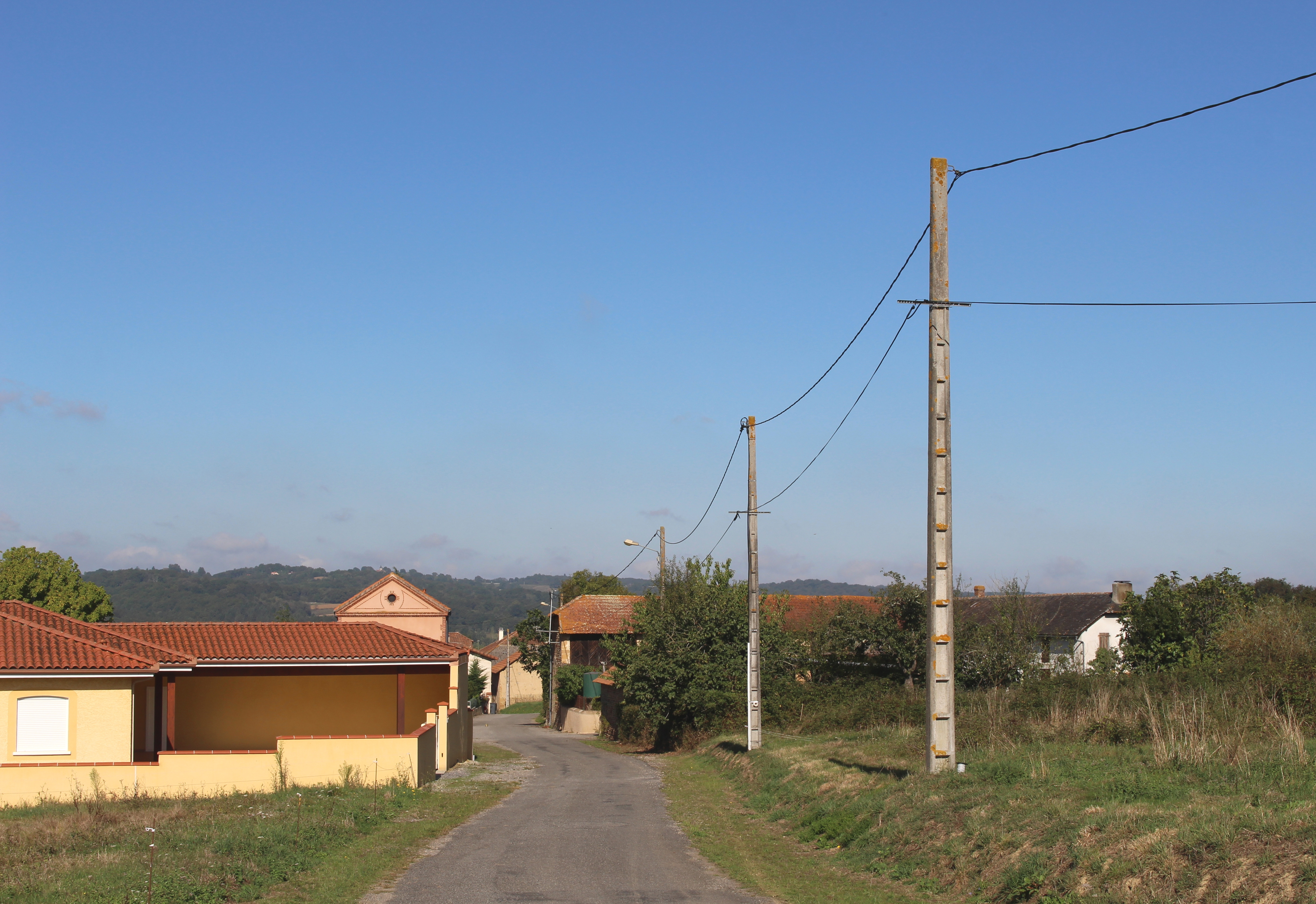 Thuy (Hautes-Pyrénées)